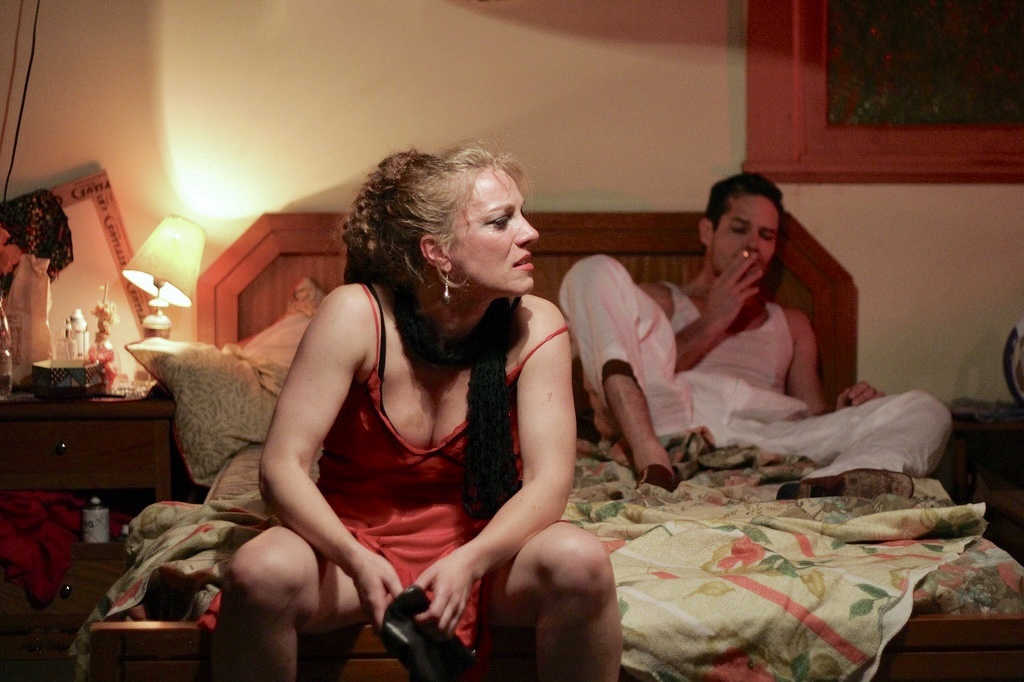 Navalha na carne en el montaje del grupo Bateia Cultura en el Festival Internacional de Teatro de São José de Rio Preto (2011)